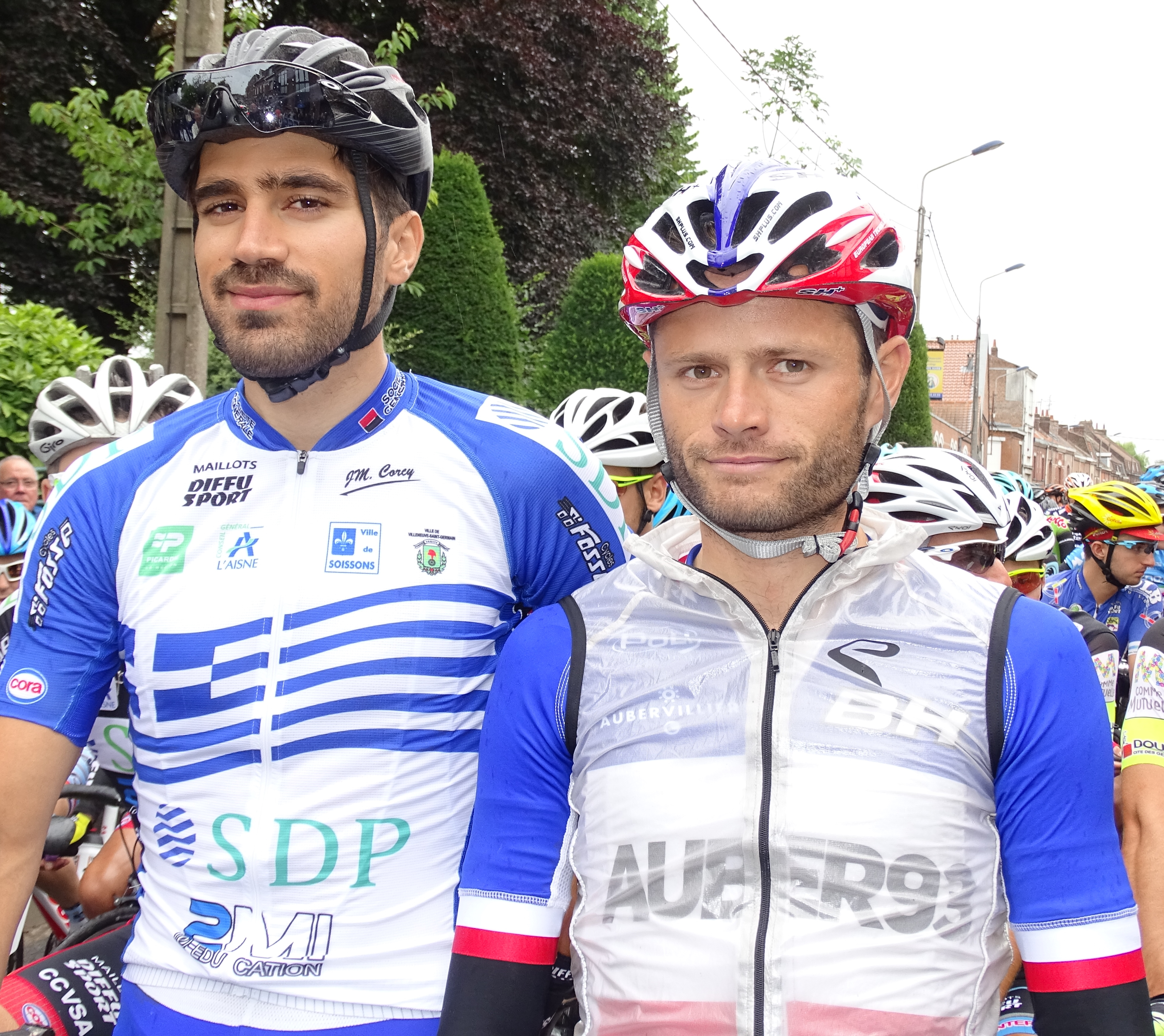 Reportage réalisé le dimanche 26 juillet à l'occasion du départ et de l'arrivée du Grand Prix de la ville de Pérenchies 2015 à Pérenchies, Nord, Nord-Pas-de-Calais, France.